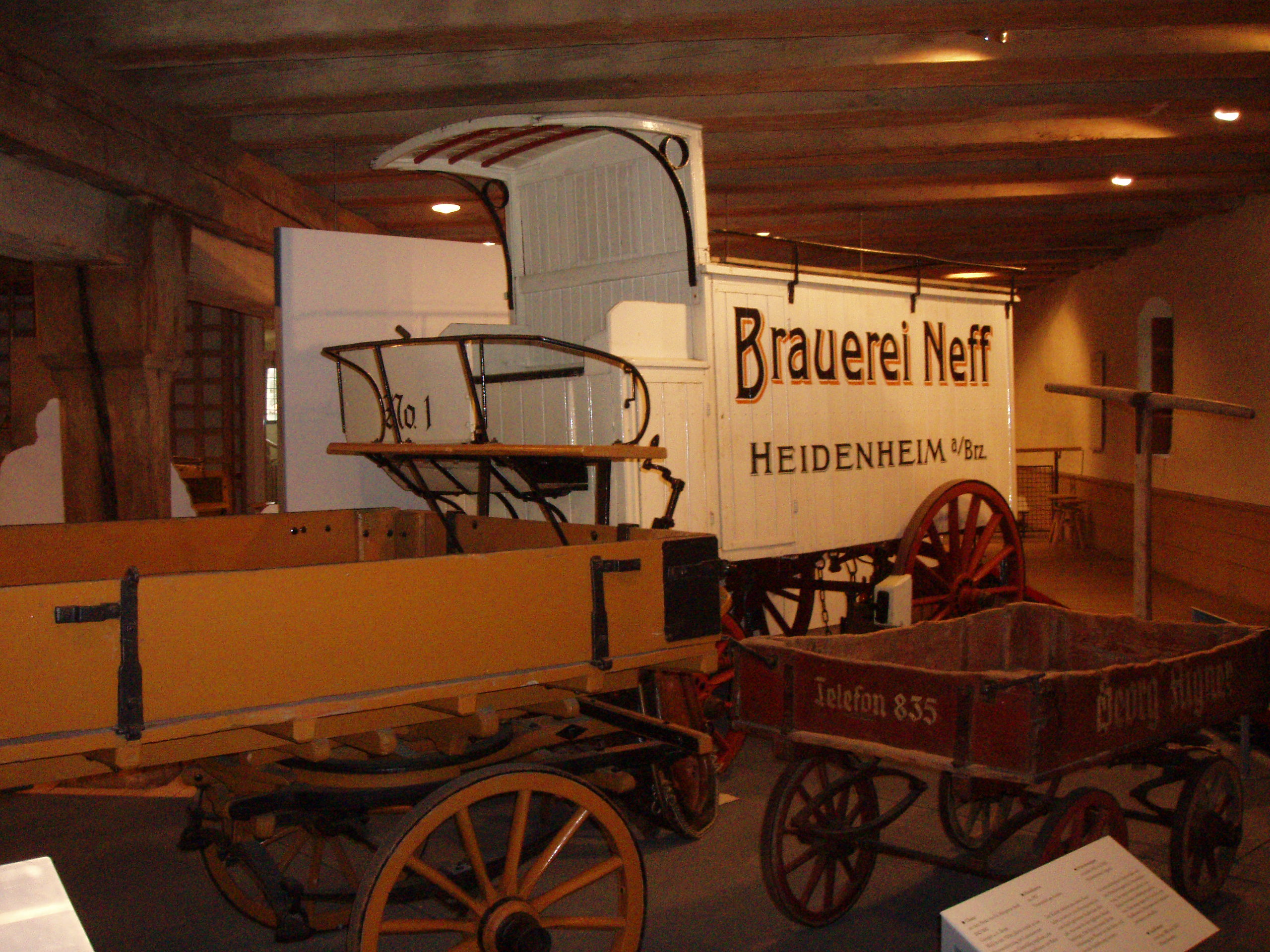 Bierwagen u. a.